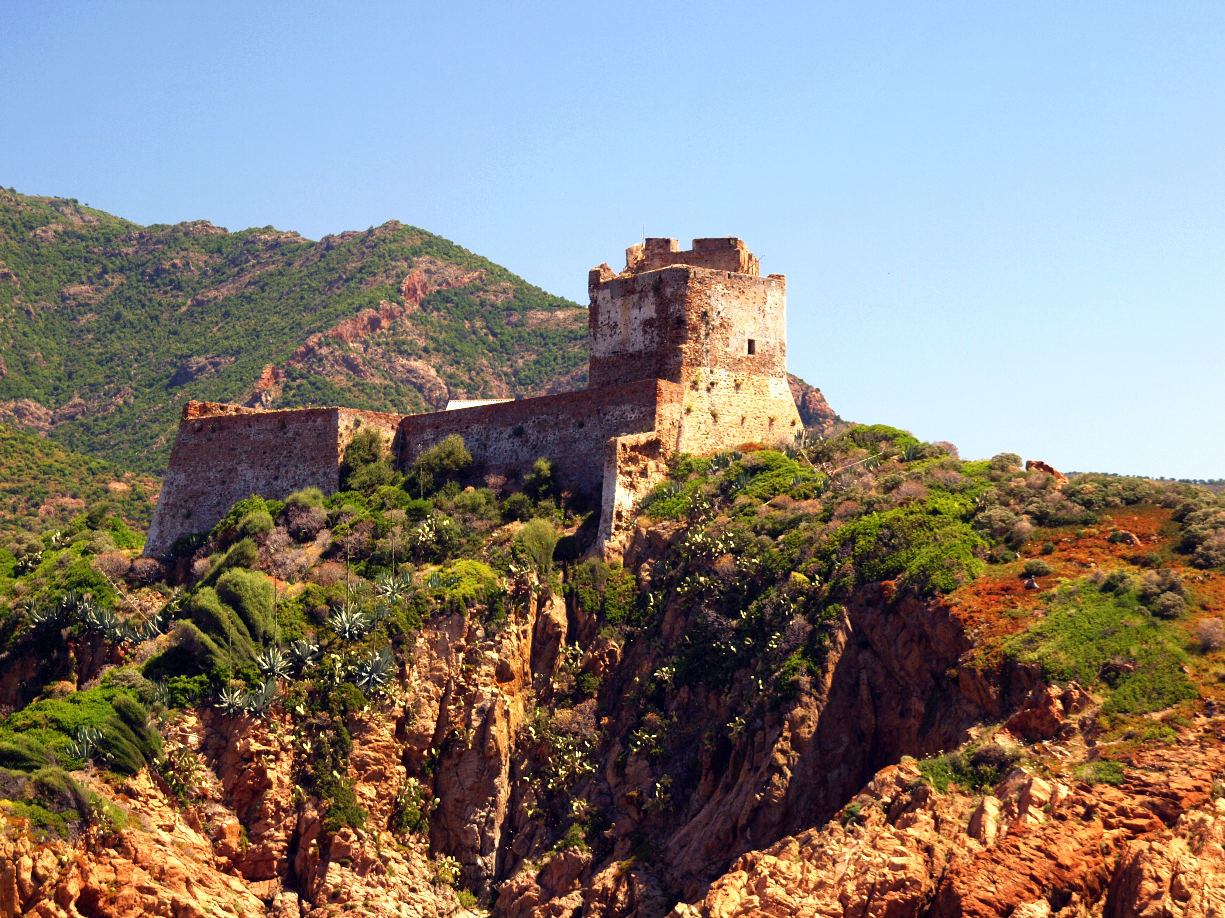 Osani, Ouest Corse (Corse) - Fortin de Girolata, construit dès 1552 par les Génois. Monument historique.